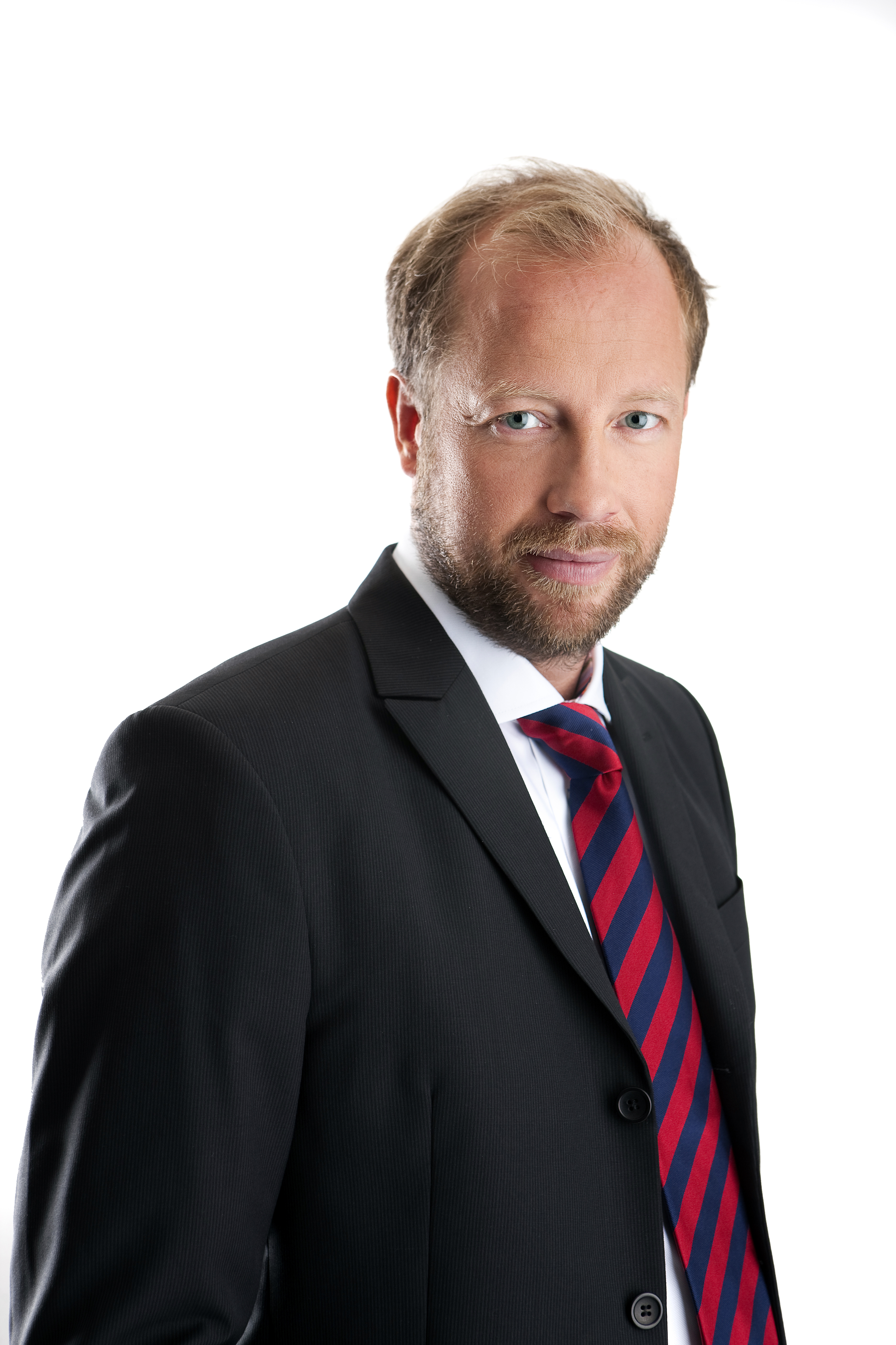 F.d. ishockeymålvakten och expertkommentatorn Petter Rönnquist.